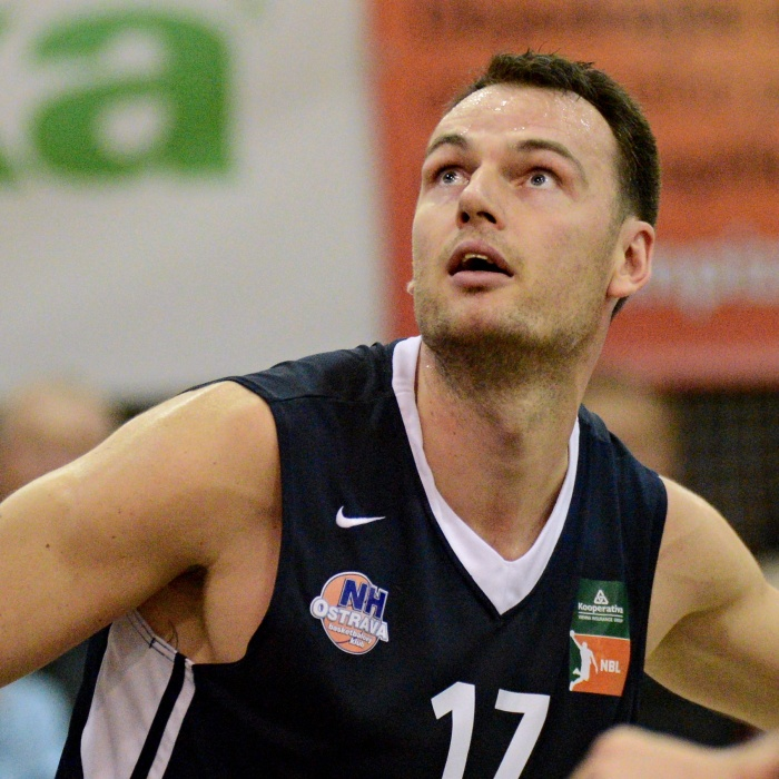 Pivot Petr Bohačík. Zápas 3.kola KNBL mezi týmy BK JIP Pardubice a NH Ostrava. Hráno v Pardubicích dne 25.10.2017